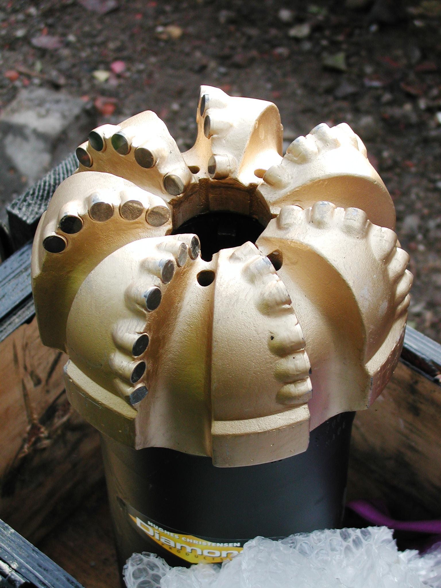 PCD-Meissel vor dem Einsatz